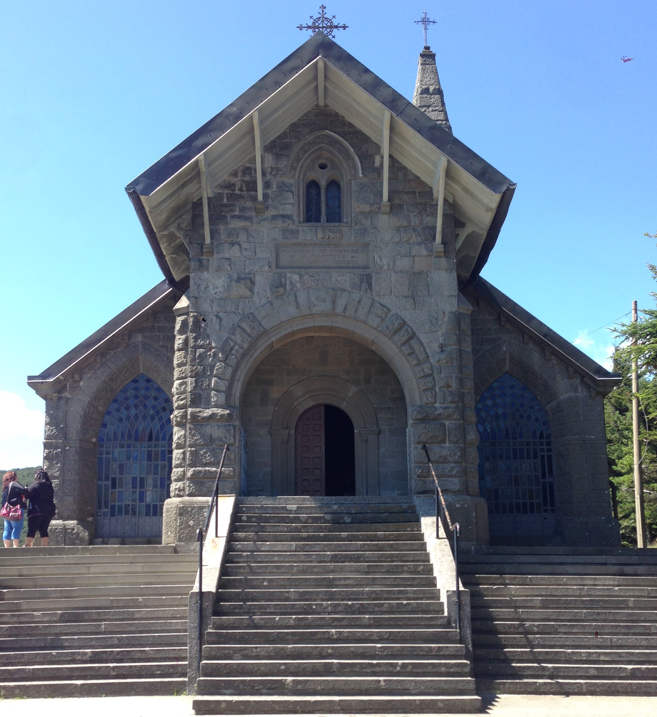 Iglesia en el Paso della Cisa